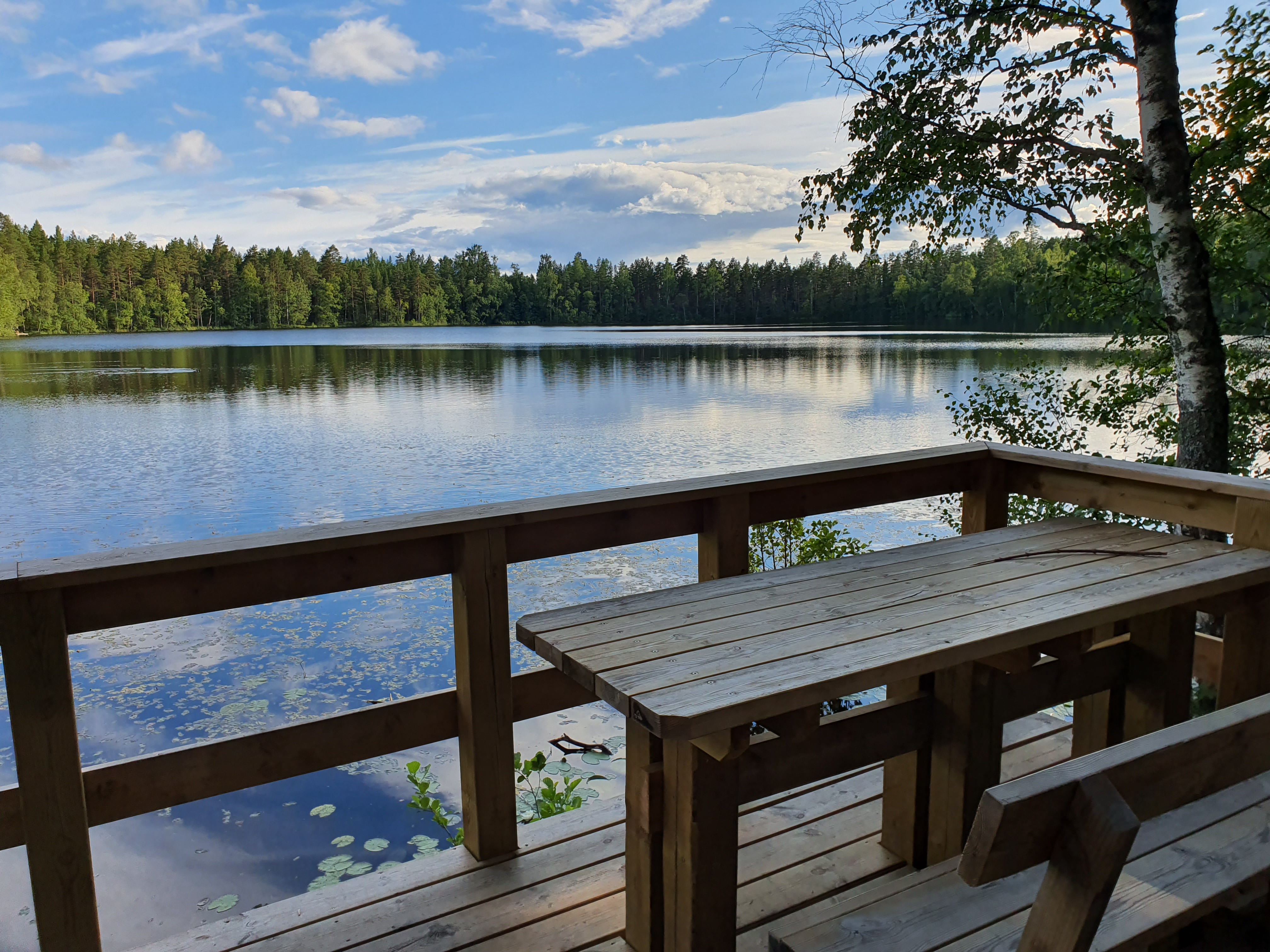 Bild över Bolletjärnen tagen en julikväll 2020 med en rastplats i förgrunden fotad från nordvästra sidan mot sydöst. I förgrunden syns några näckrosblad av den vita näckrosen samt ett större fält av någon vattenväxt längre ut från stranden, kvällssolen lyser fortfarande på skogen på motsatt sida om tjärnen.